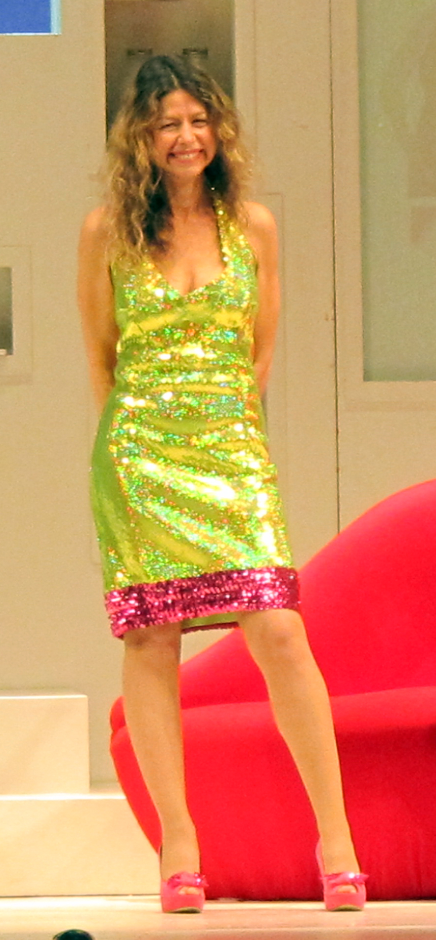 Teatro Giuseppe Verdi (Firenze)